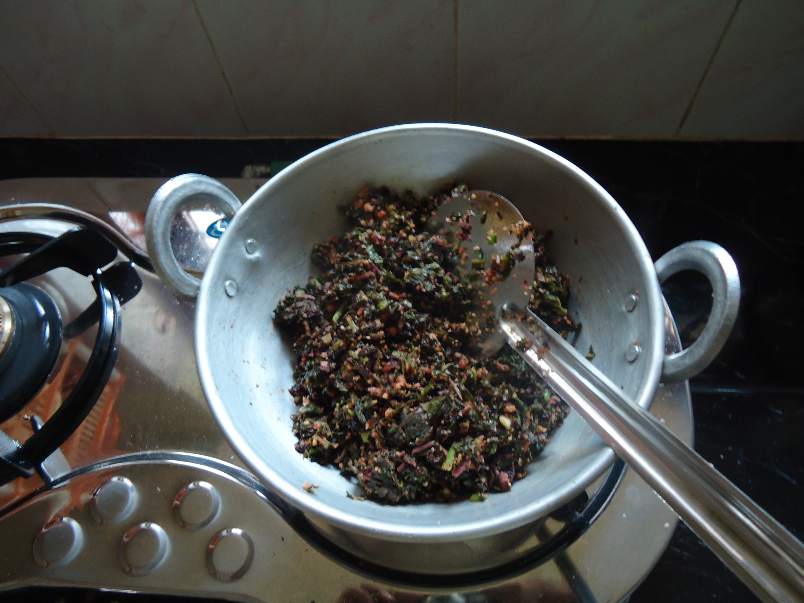 ചീരത്തോരന്‍ തയ്യാറാക്കി വച്ചിരിക്കുന്നു.